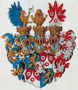 Wappen derer Grafen Schlick (Schlik) von Bassano (Pass(u)n) und Weißkirchen